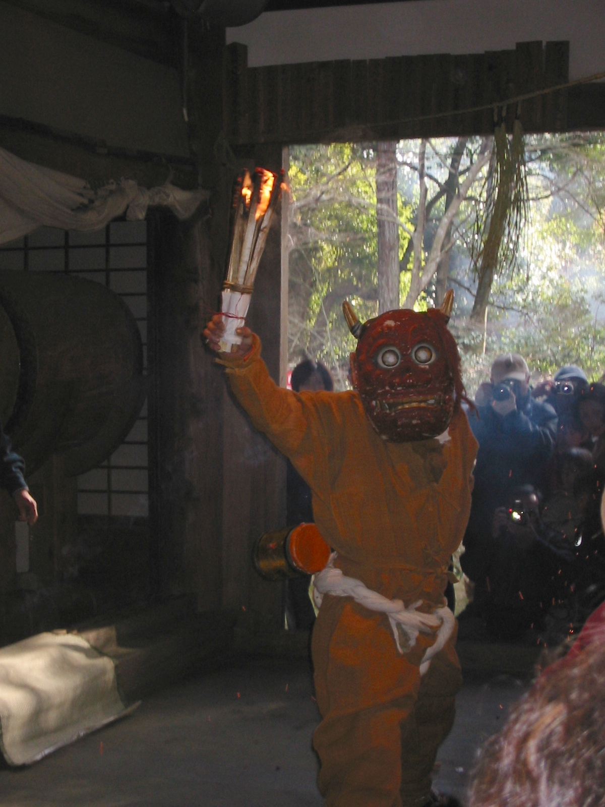 三木市蓮花寺に約800年続く鬼踊り(追儺式)で一般的な鬼と違い災厄を祓う鬼で飛び散る松明を持ち帰ると良いとされる